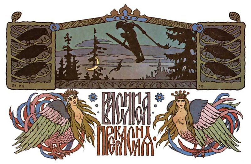 Иван Билибин. Рисунок с первой страницы сказки «Василиса Прекрасная»